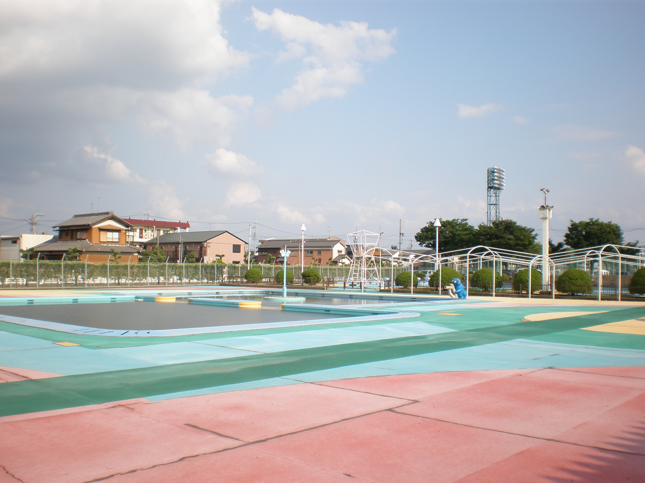 愛知県小牧市にある小牧市南スポーツセンター